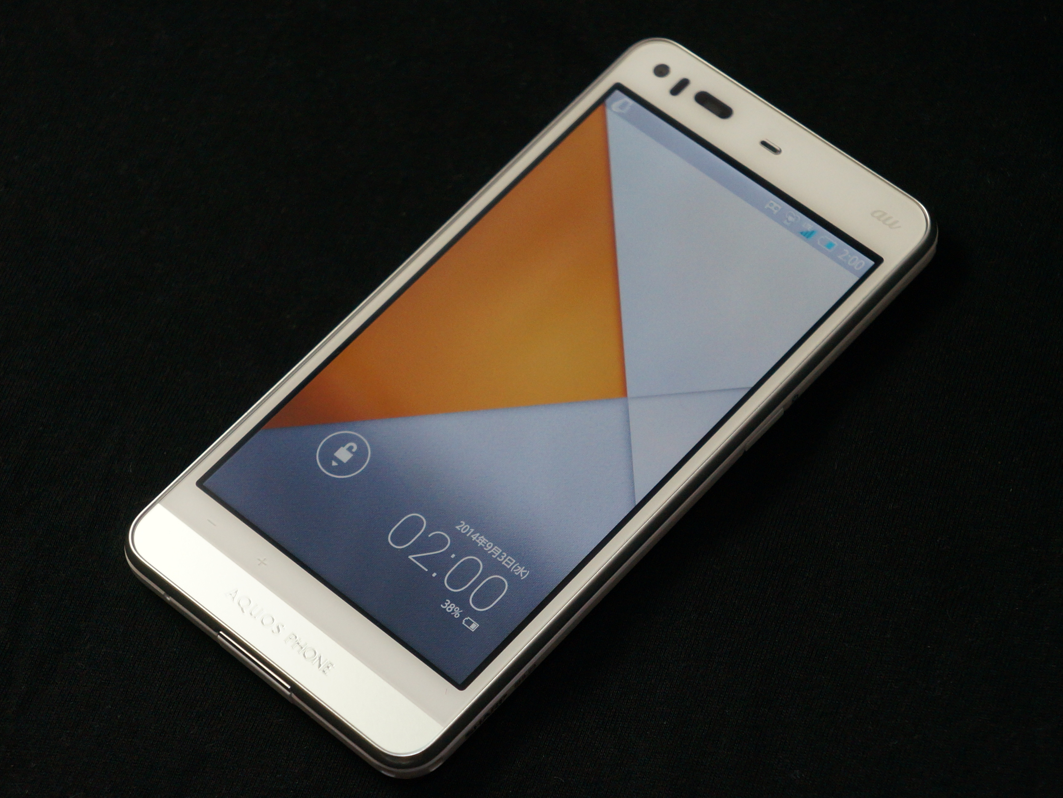 SHARP smartphone, AQUOS PHONE SERIE SHL23.